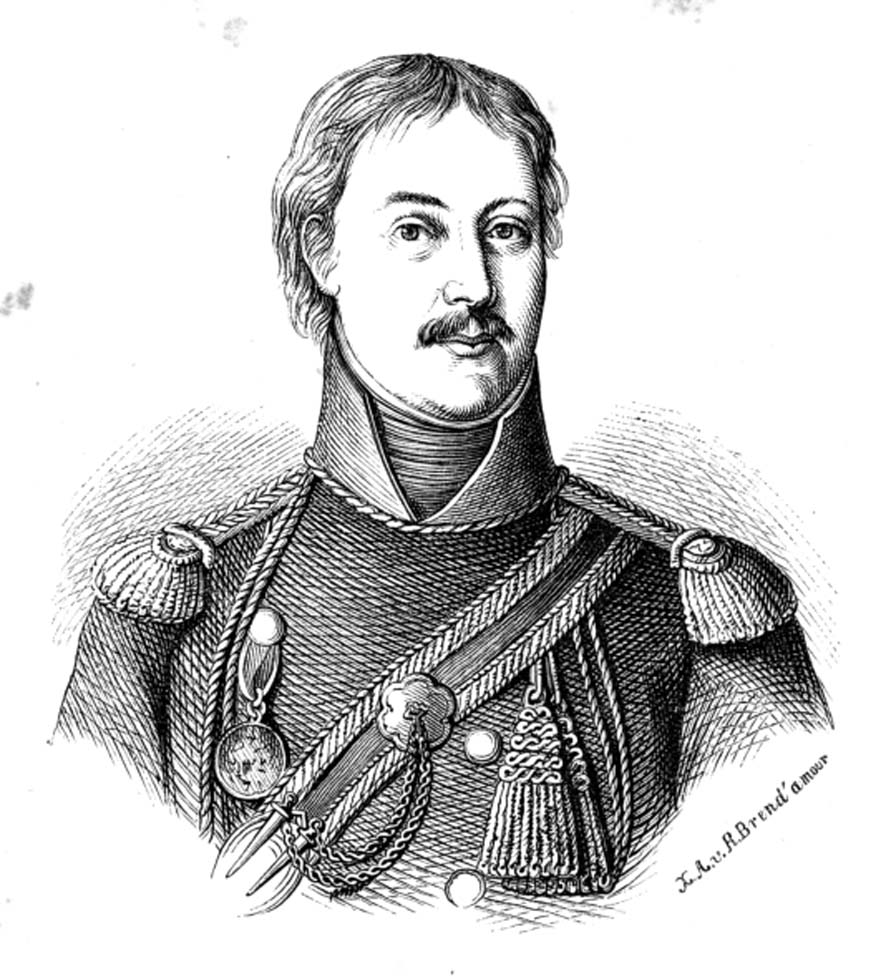 Porträt von Ferdinand Stucker aus dem Buch: Die Helden und Bürger und Bauern vom Niederrhein von Montanus, Opladen 1870